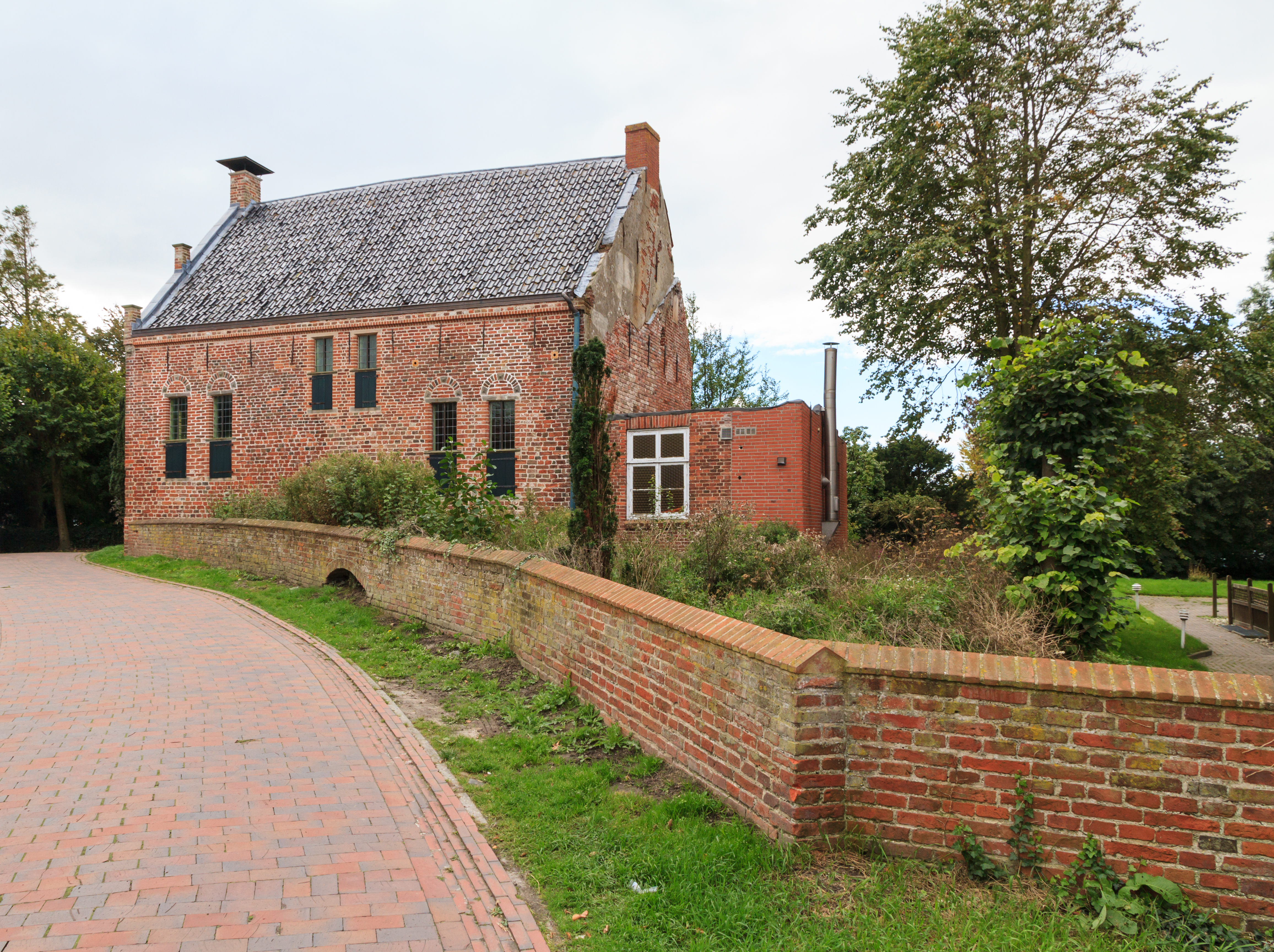 Steinhaus, ursprünglich aus dem 16. Jahrhundert mit einem Keller um 1400